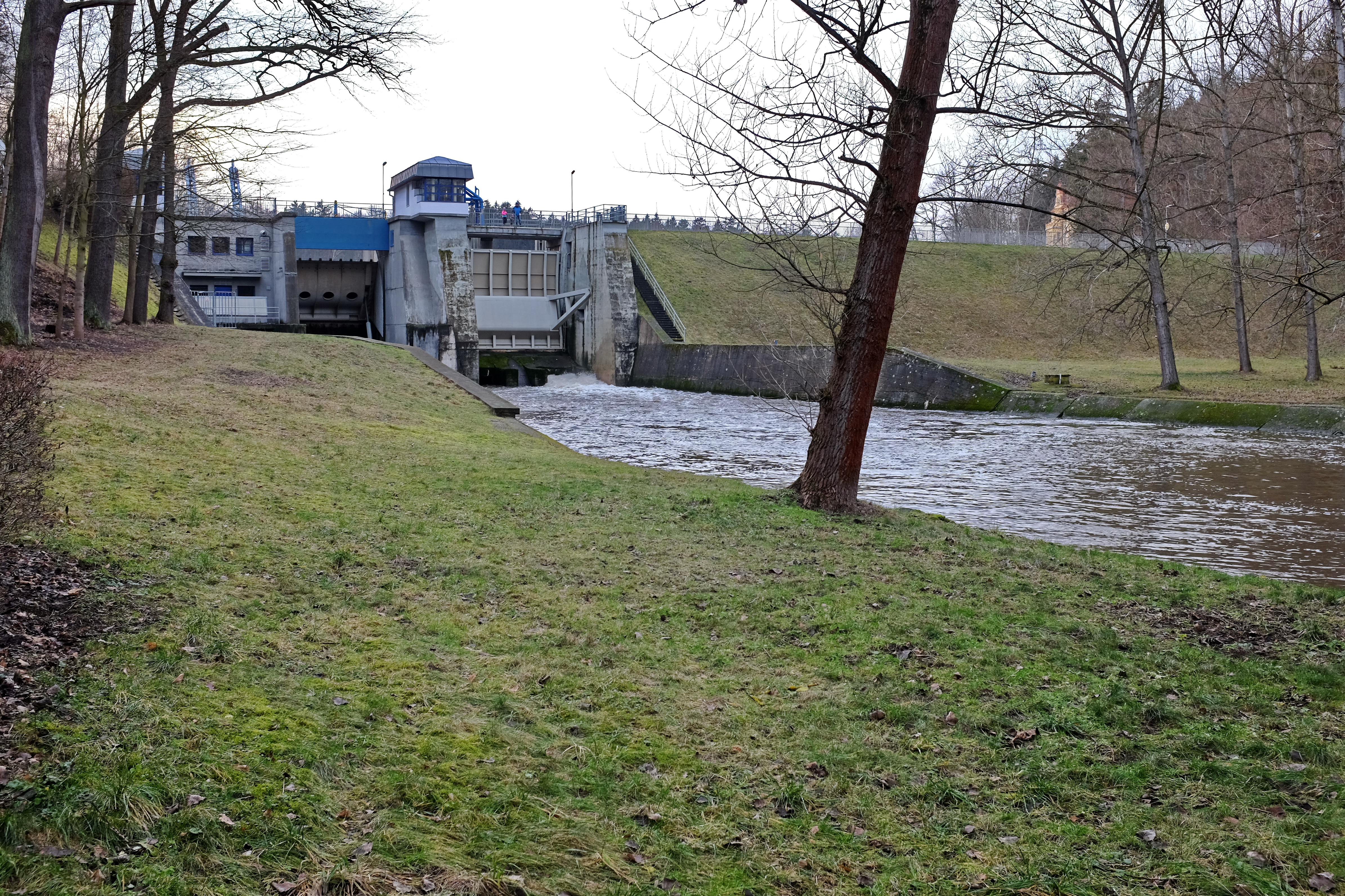 Vodní nádrž Skalka, Cheb